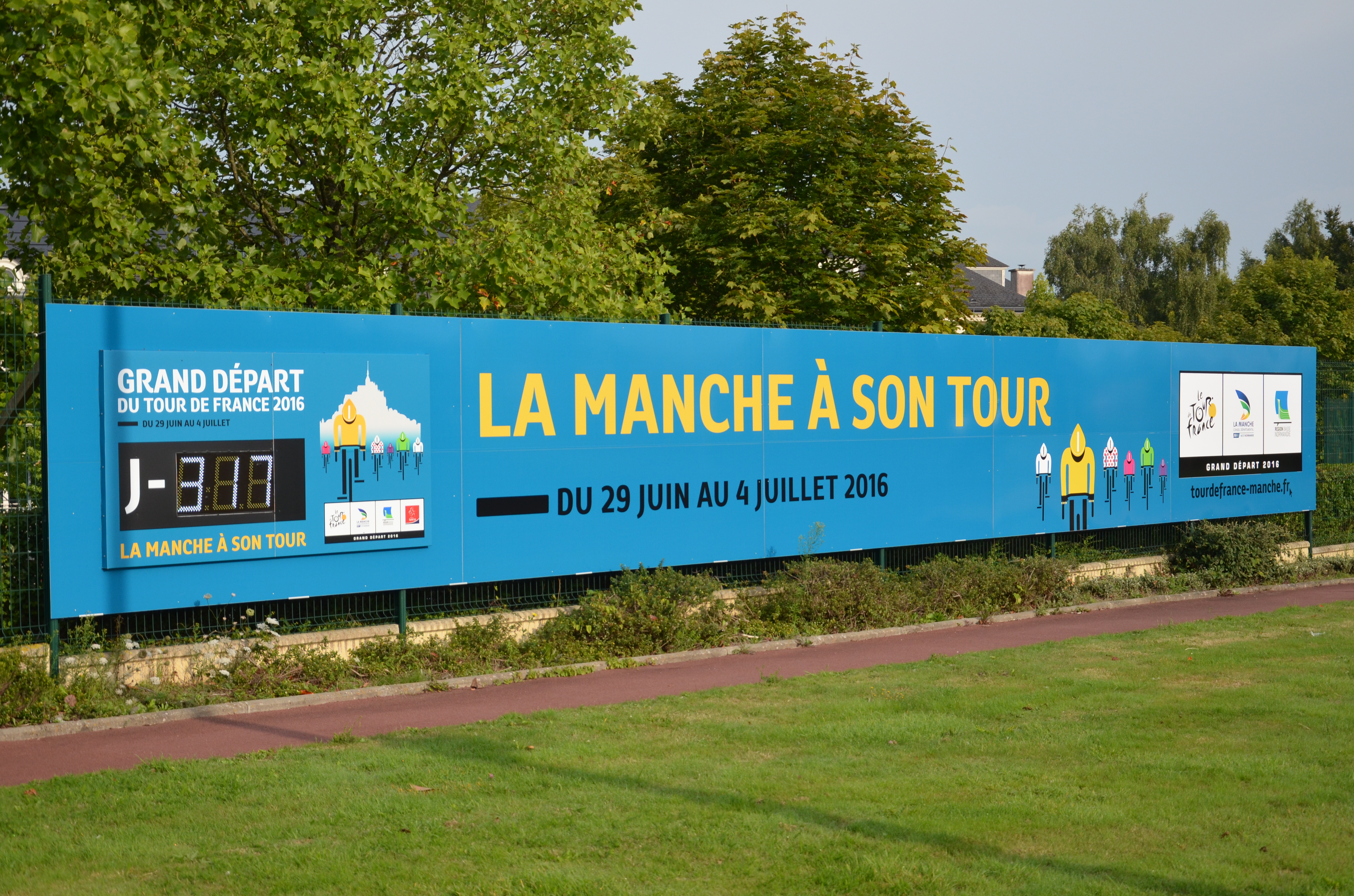 Compte à rebours avant le Grand départ du Tour de France, installé devant le Conseil départemental de la Manche, à Saint-Lô, ville départ de la 2e étape.